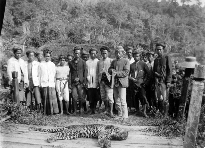 Foto. Groep javanen poseren achter een geschoten panter, de jager staat nog met een geweer in zijn hand